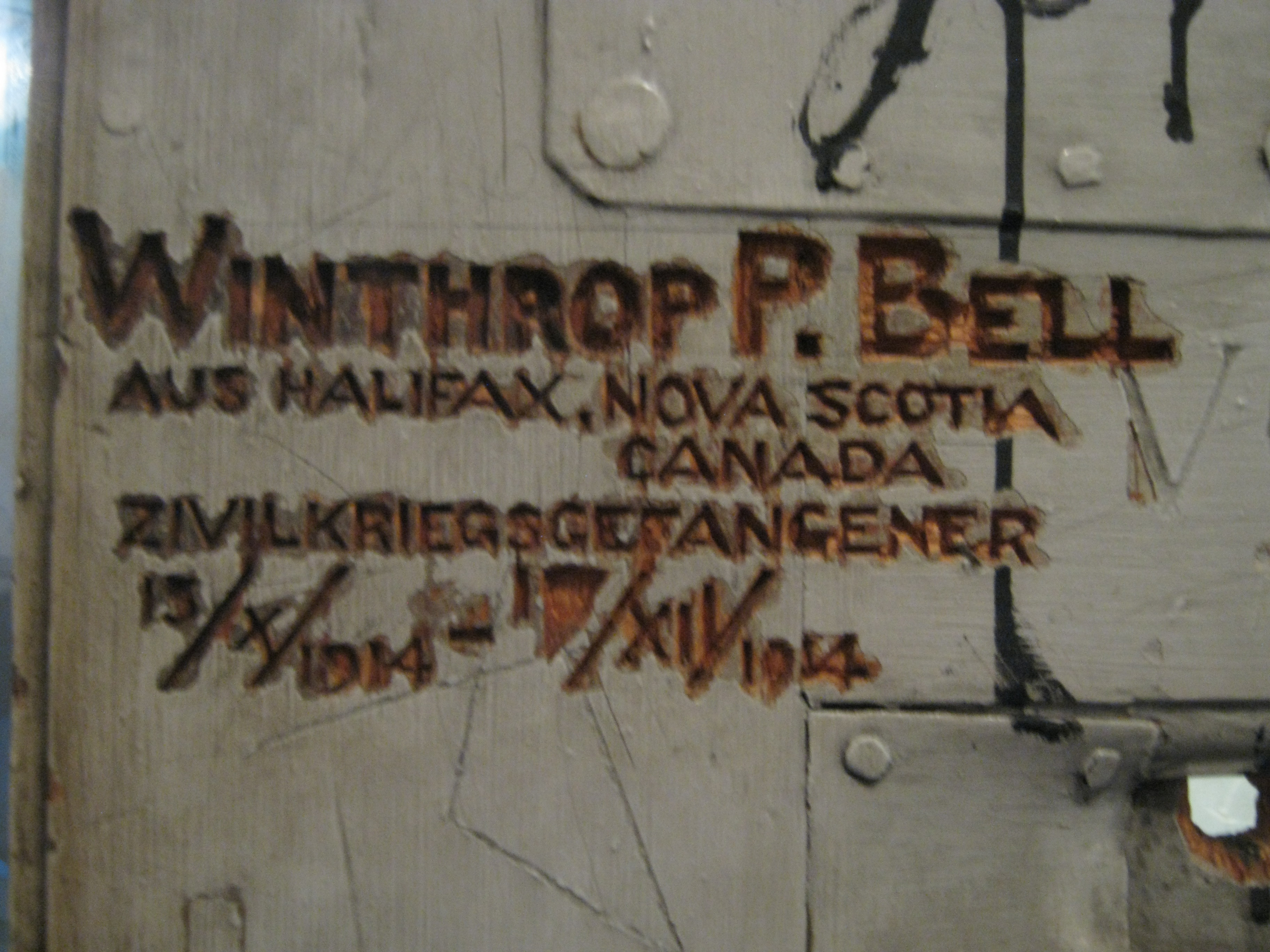 Ritzung an der Tür zu einer der Karzer-Zellen im 3. Stock der Universitätsaula am Wilhelmsplatz, Göttingen